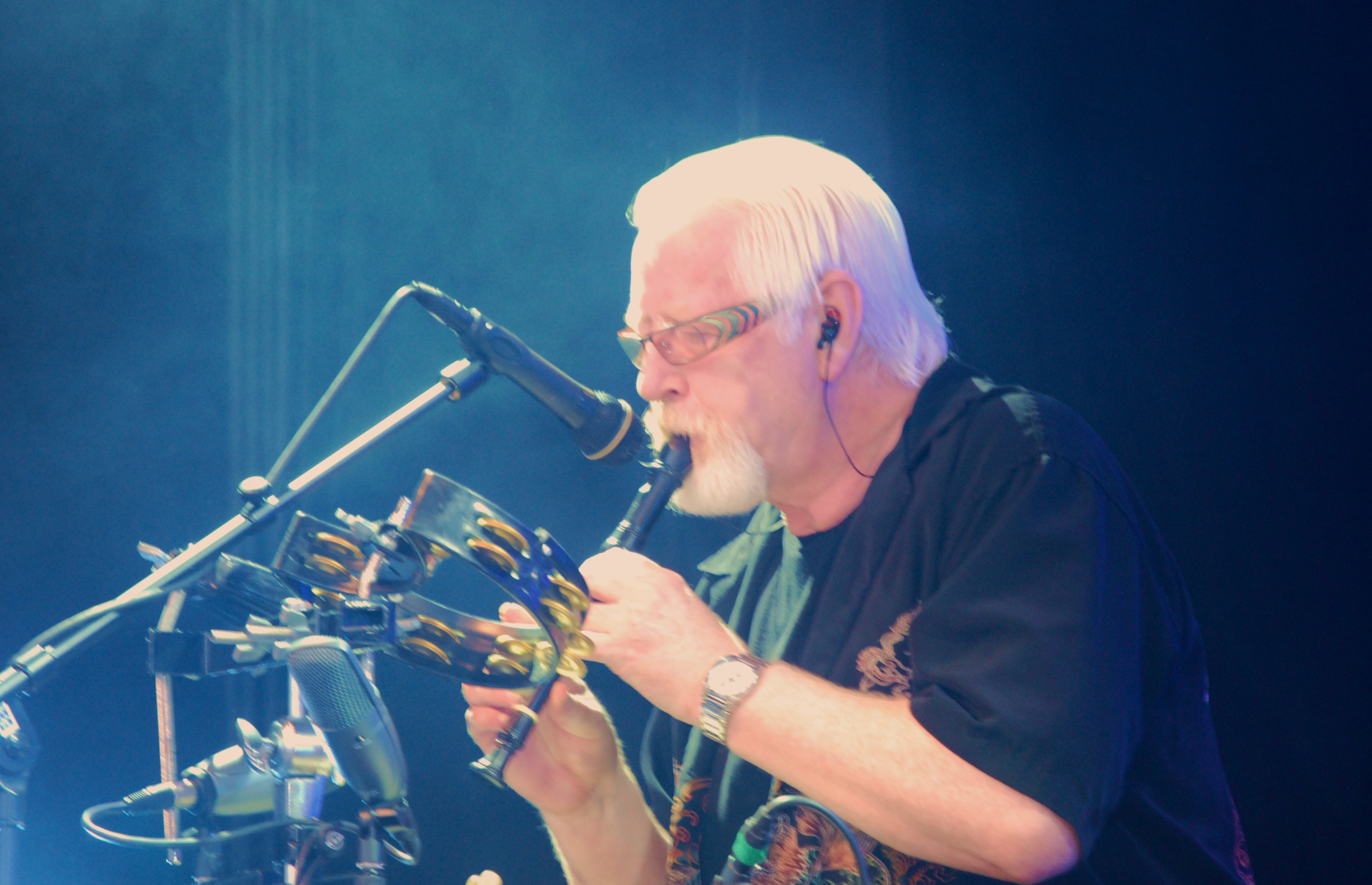 Arne Moslåtten fra Hellbillies under en konsert i Langesund juli 2011.